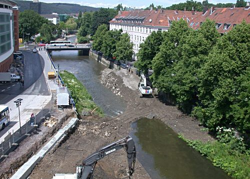 Die Stadt Hagen renaturiert das Flussbett der Volme